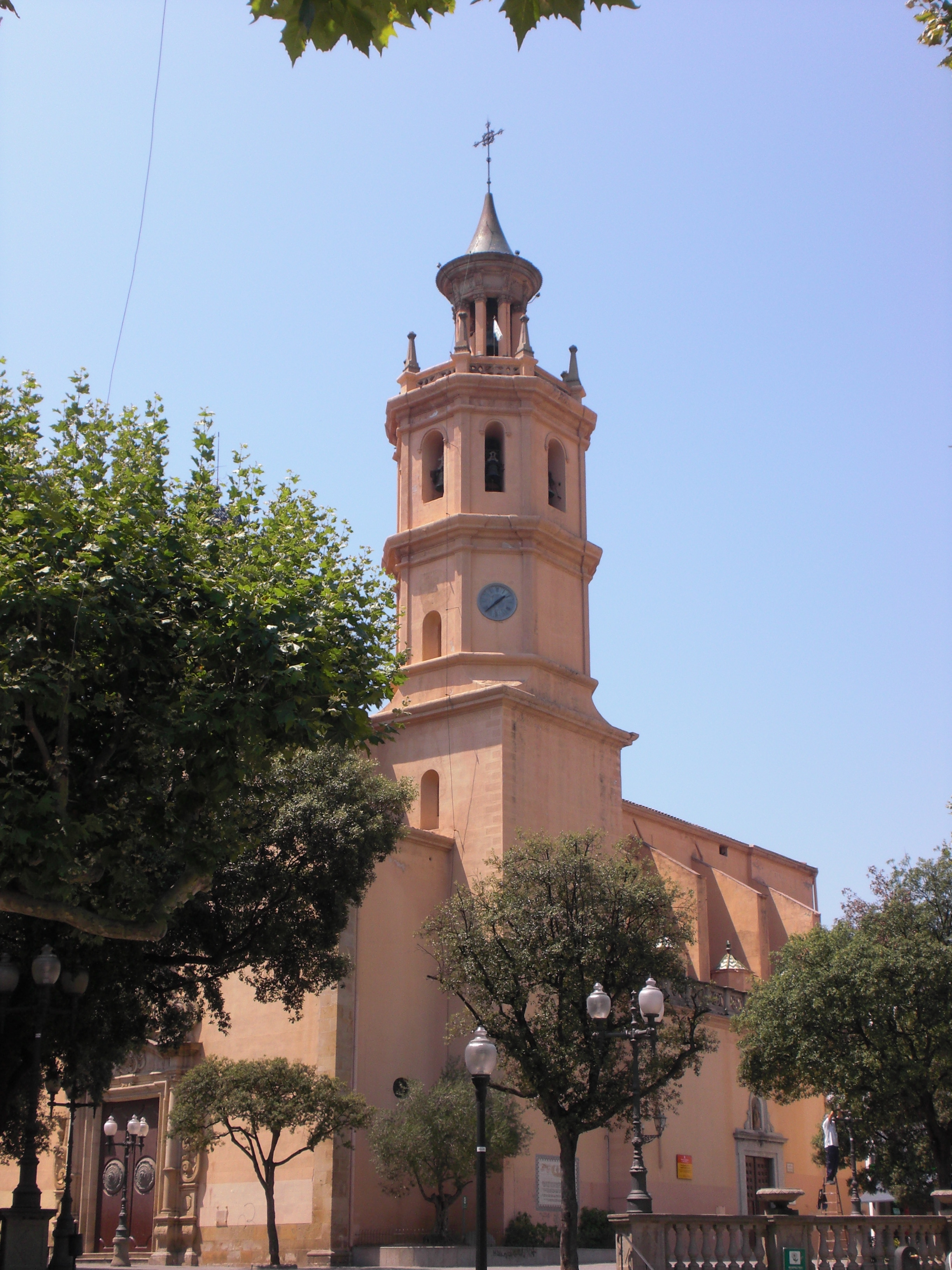 Vistes de la Esglesia des de la Riera.